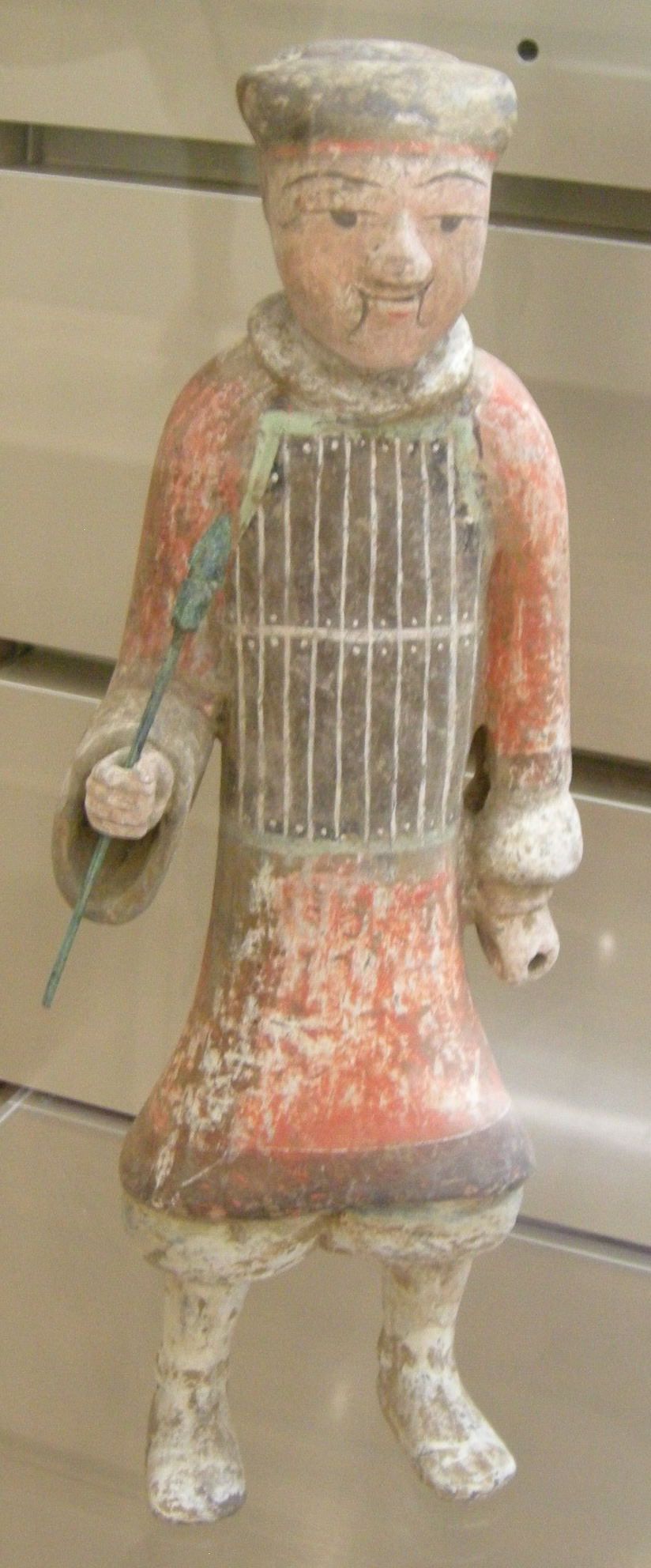 Shaanxi, han occidentali, fante, II sec. ac.